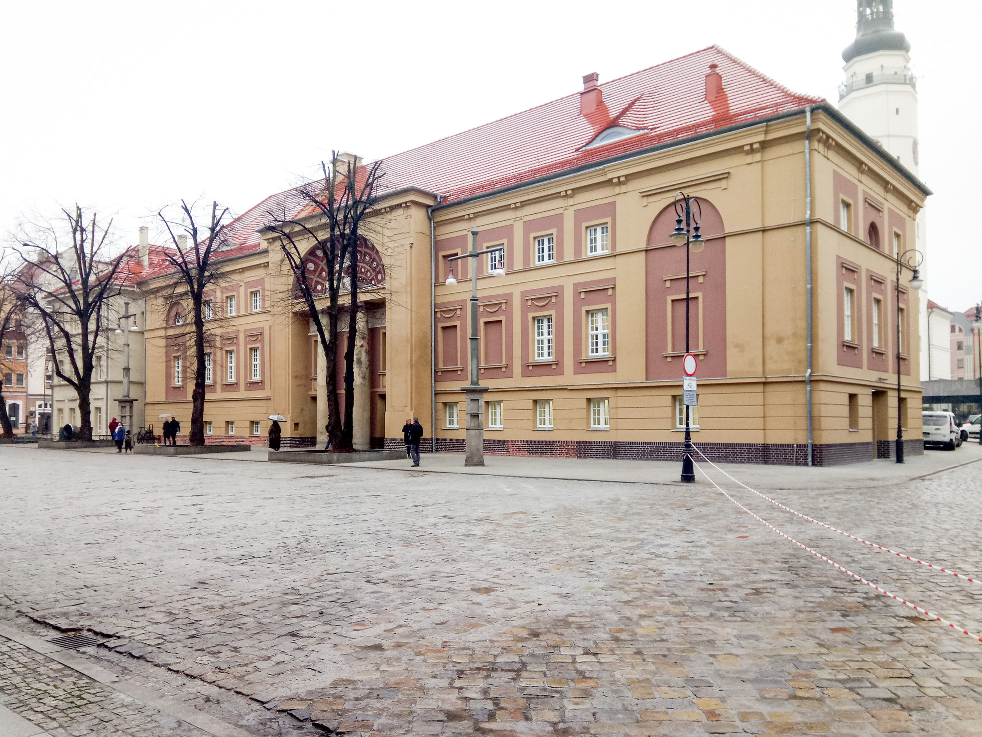 Widok na zewnątrz Teatru Miejskiego im. Andreasa Gryphiusa w Głogowie.